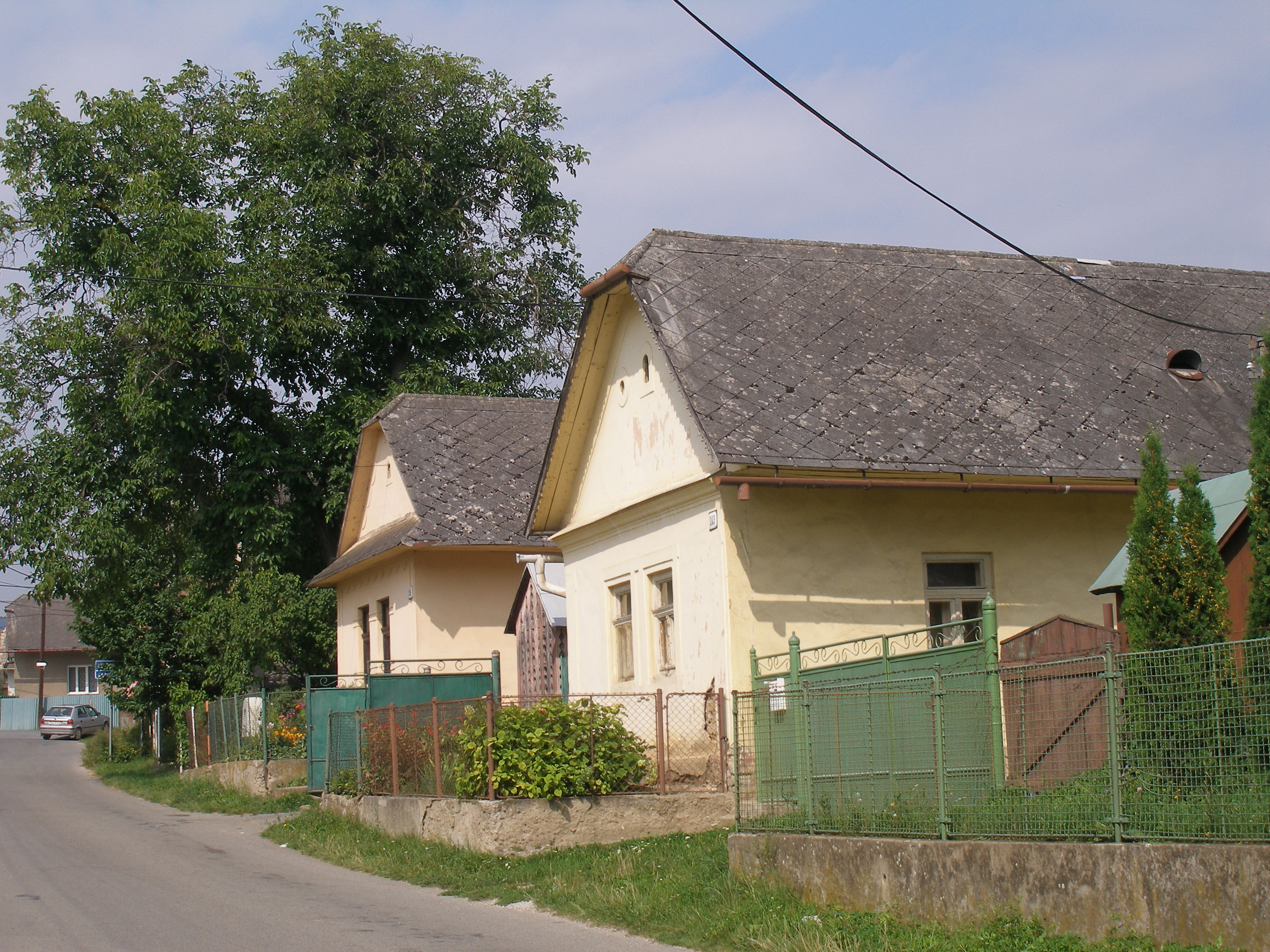 Šarišská obec Lažany